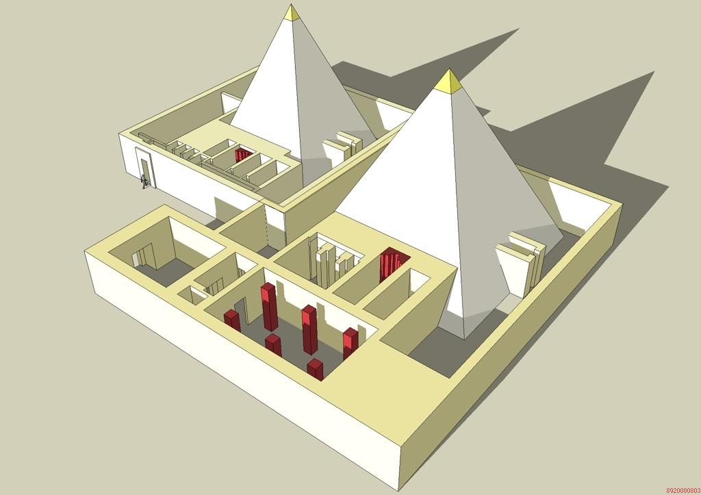 Proposition d'élévation des pyramides de Khouit II et d'Ipout Ire à Saqqarah - VIe dynastie égyptienne